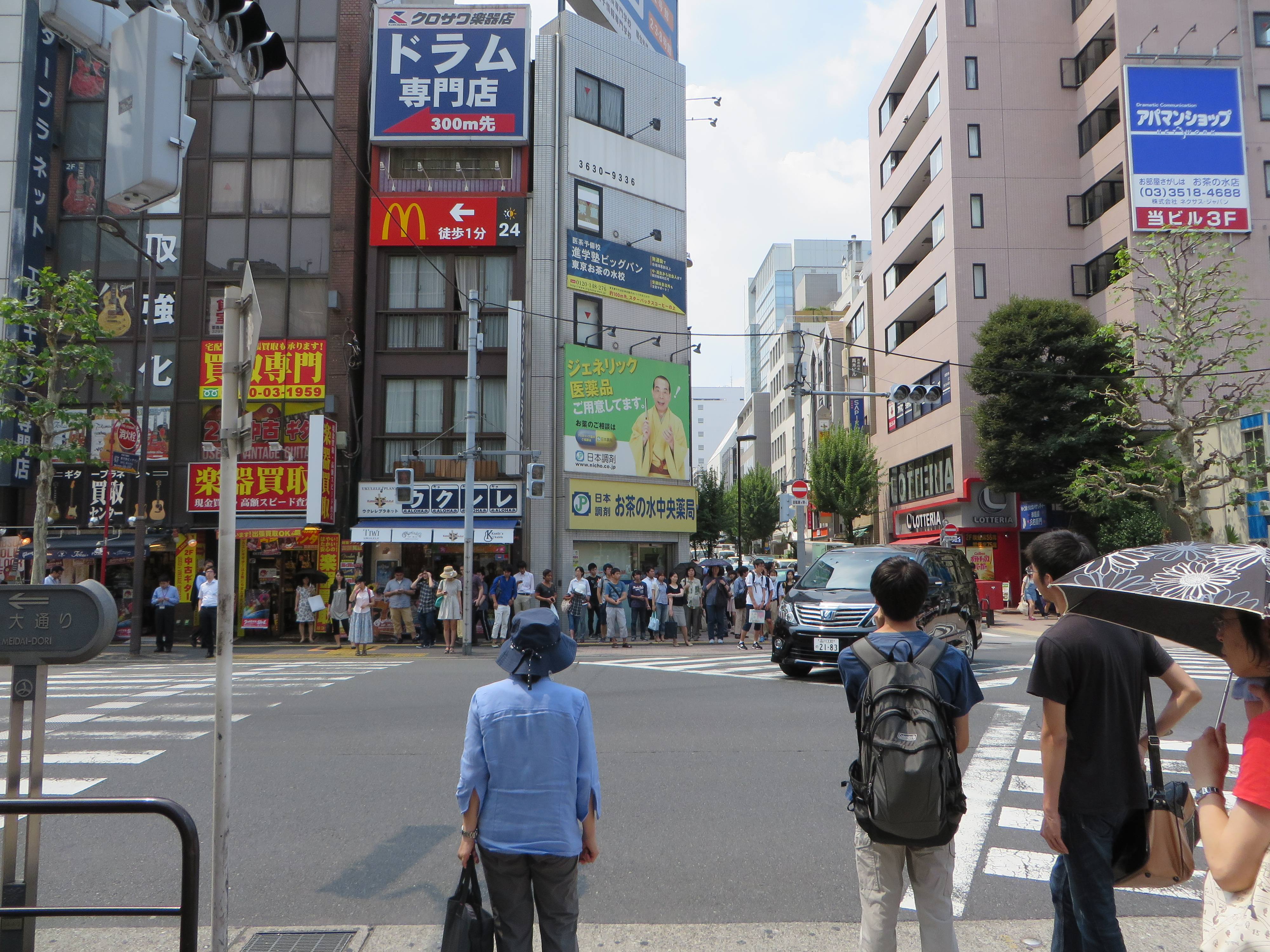 2 Chome Kanda Surugadai, Chiyoda-ku, Tōkyō-to 101-0062, Japan